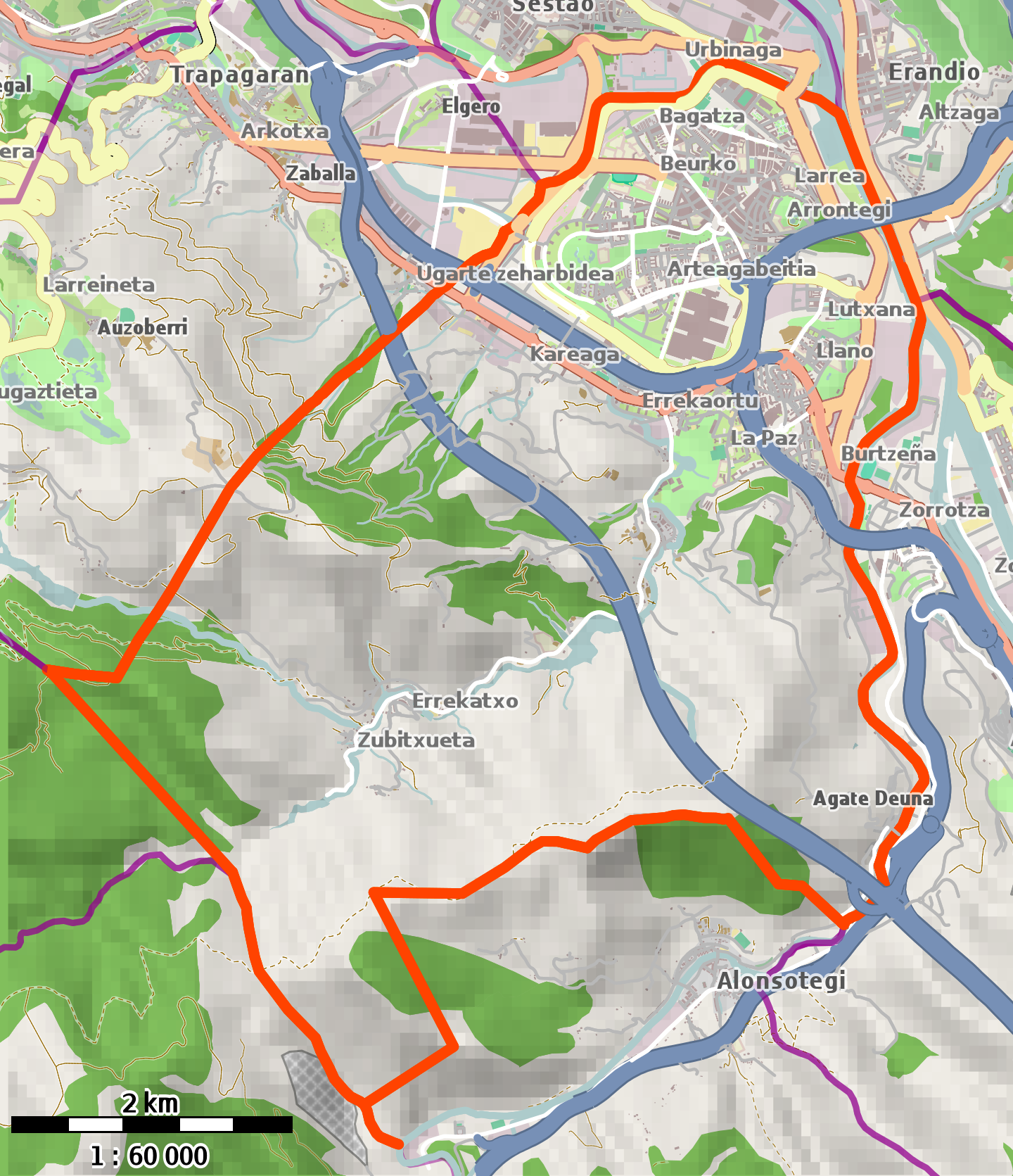 Barakaldoko udalerria OSM 2016